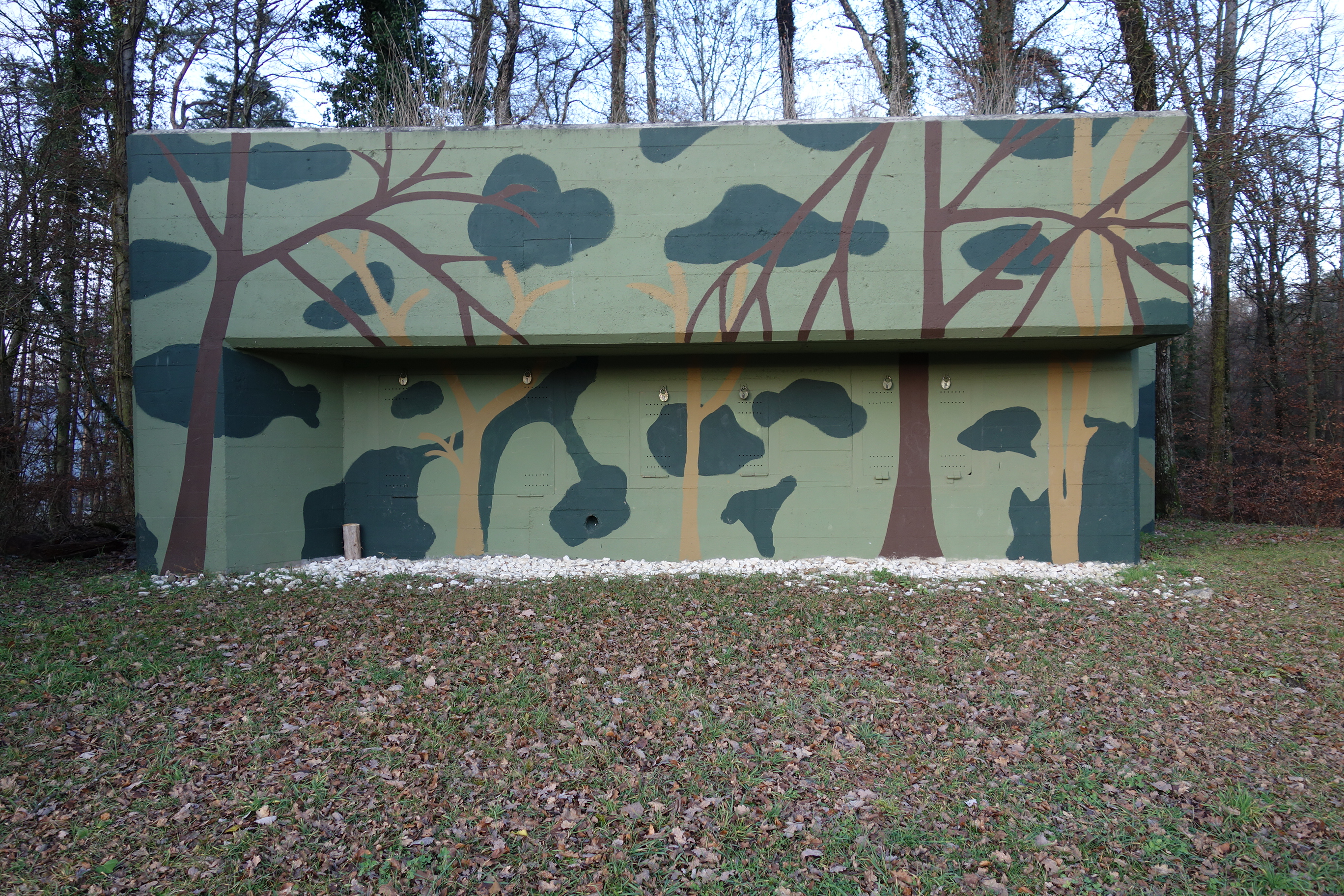 Sperrstelle Leibstadt AG, Schweiz